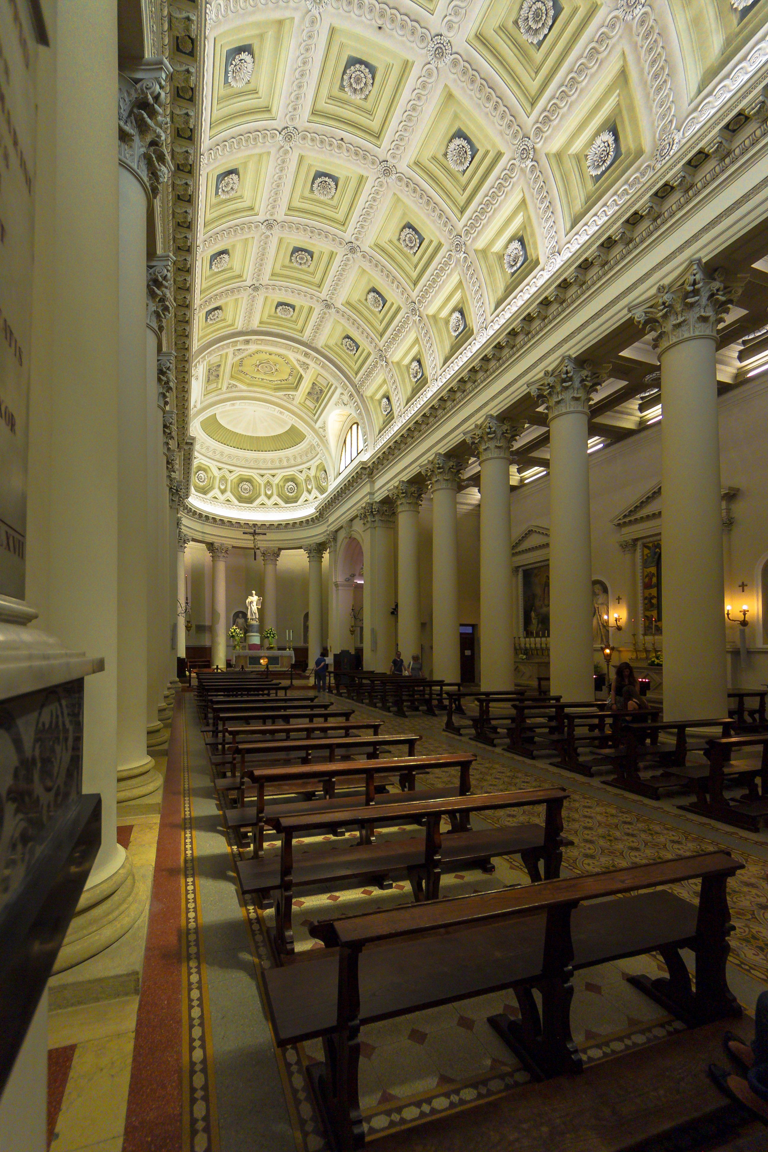 hervorragende Mischung aus Kunst- und Taglicht